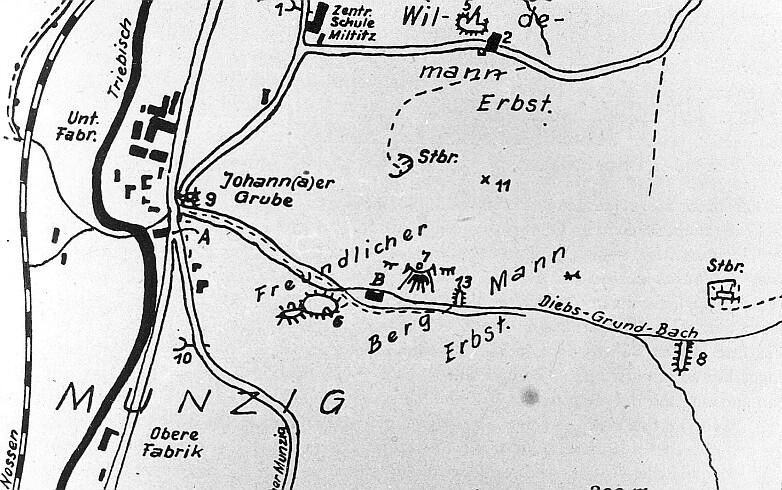 Original image description from the Deutsche Fotothek Triebischtal-Munzig. Bergbau, Kartenskizze vom Diebesgrund, aus: Heimatkundl. Blätter Nr. 3, 1957